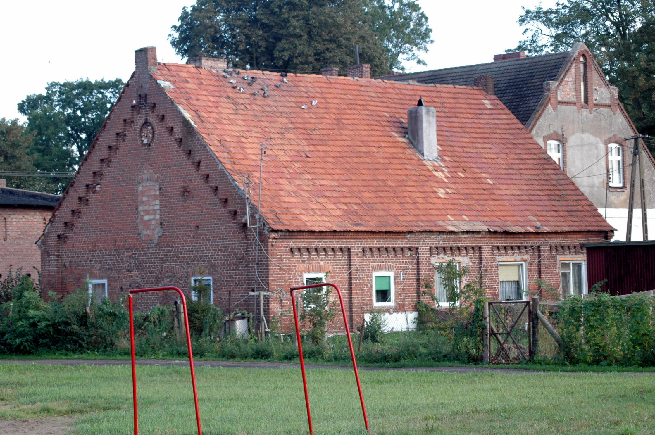 Dom w Uninie.